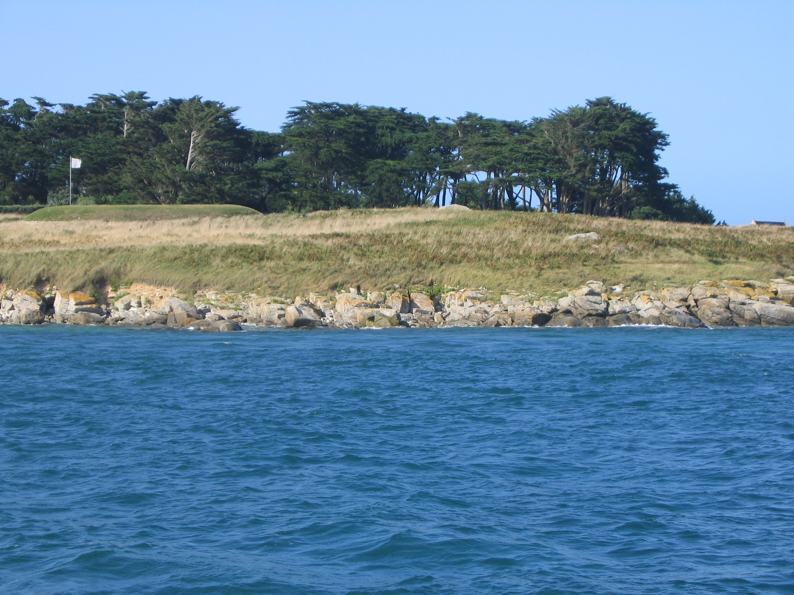 Batterie de Penn ar C'hleguer sur l'île de Batz